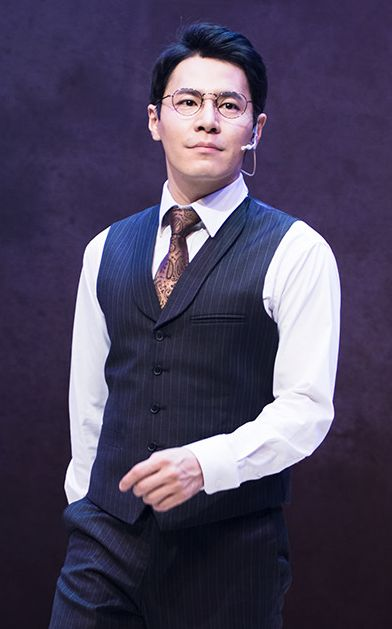 2016.10.14《Fan Letter》謝幕_李奎炯